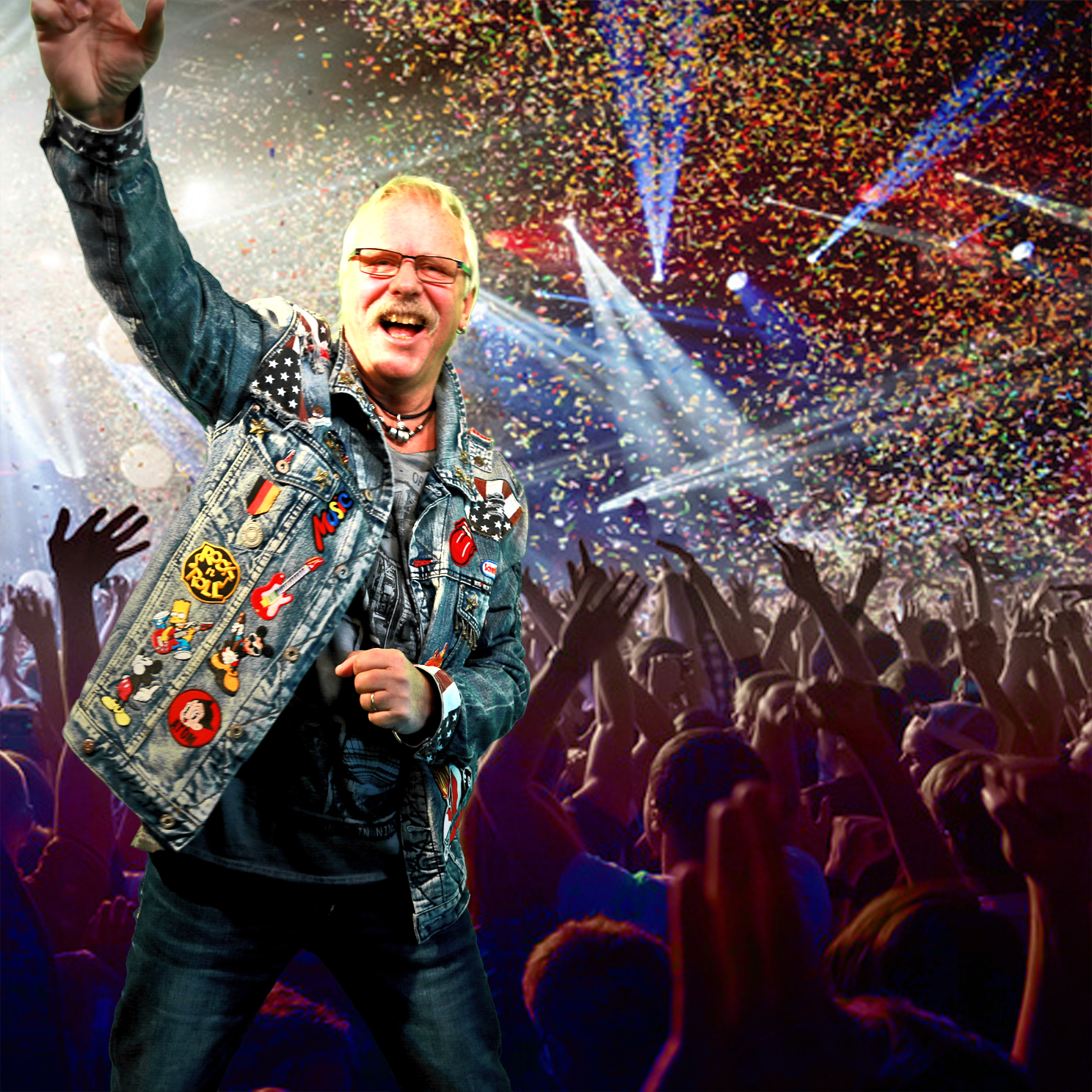 Schmitti Live Party Schlager Musik